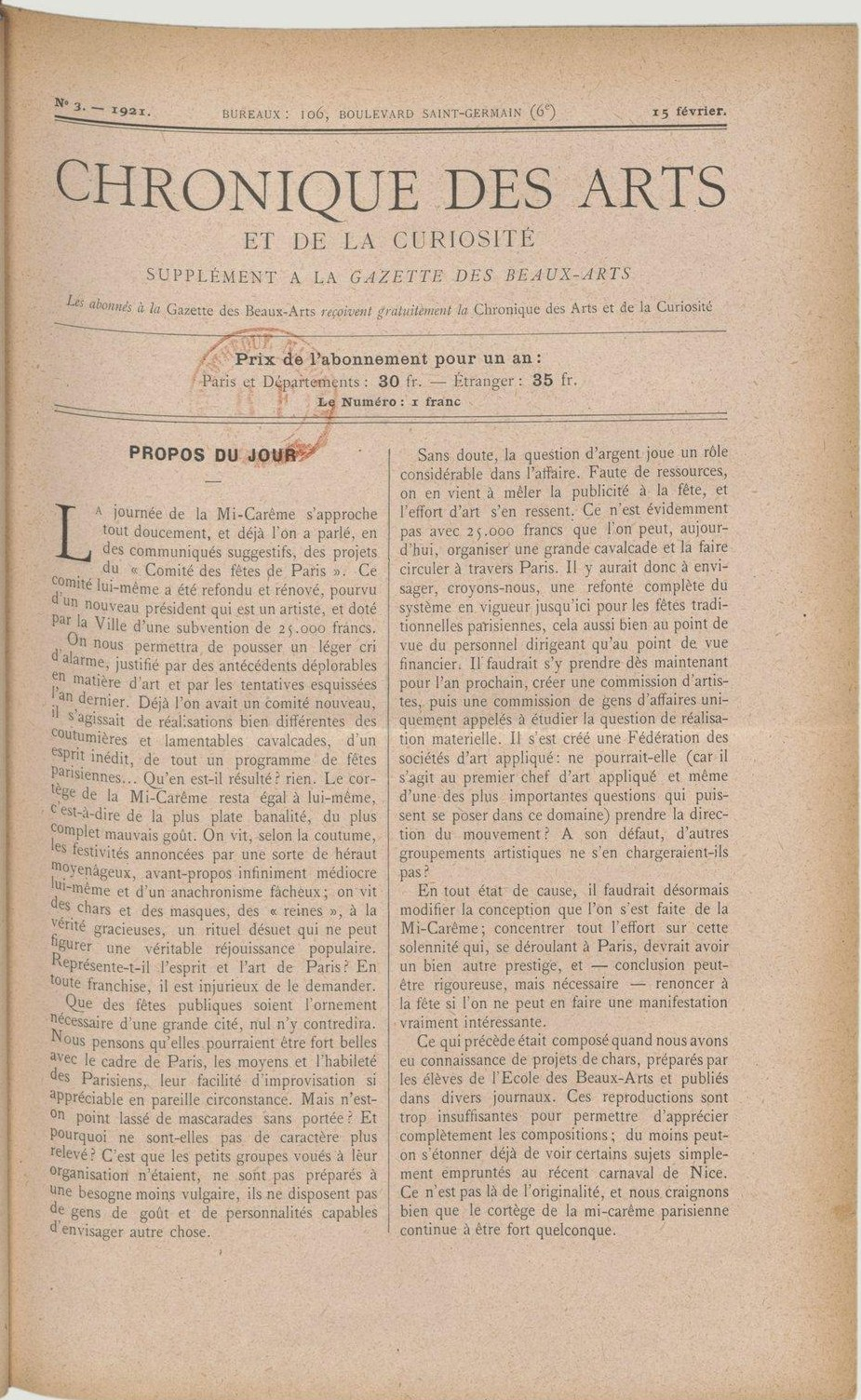 Préparatifs de la Mi-Carême 1921 à Paris.